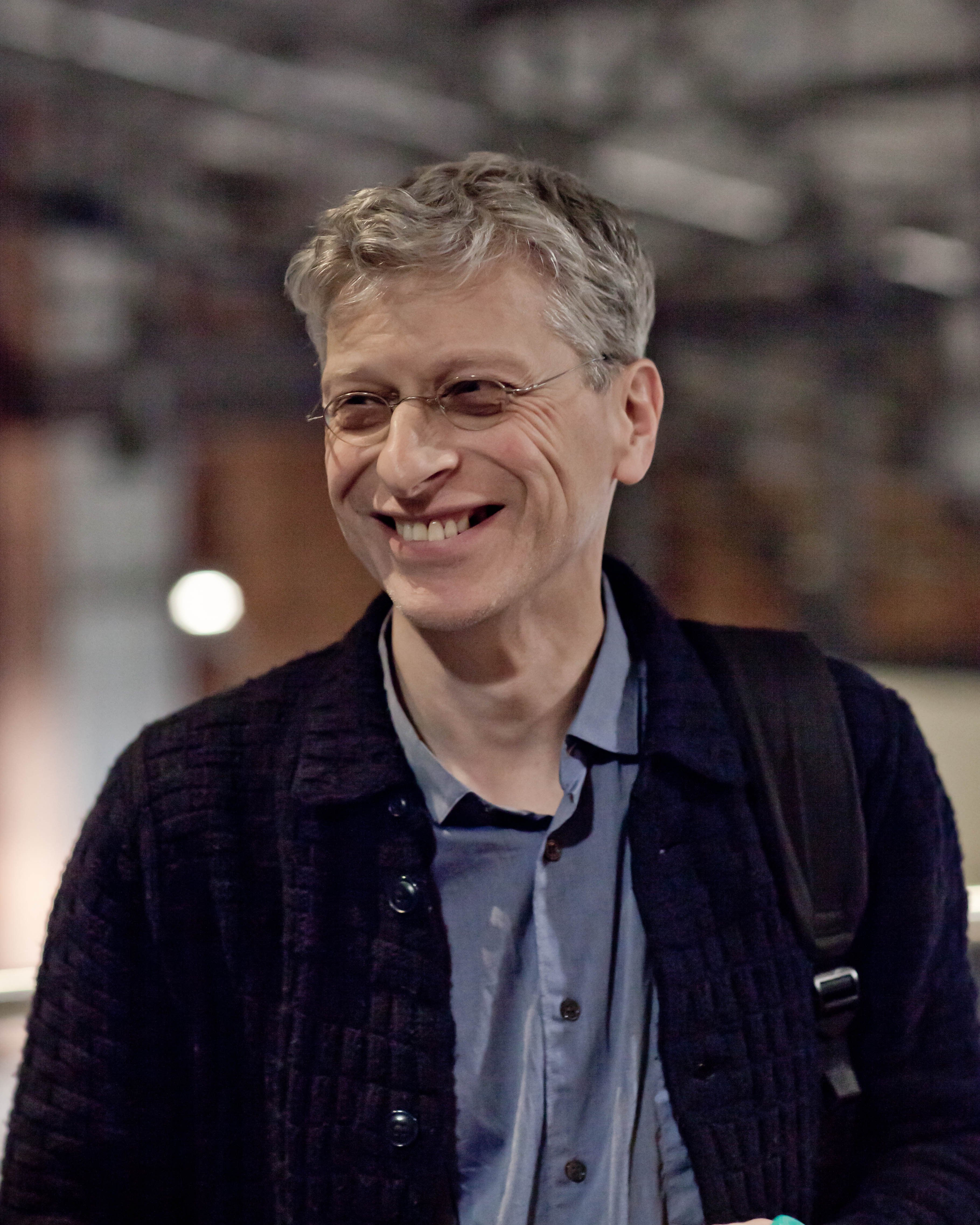 Сергей Ливнев и Дмитрий Быков на предпремьерном показе фильма С. Ливнева "Ван Гоги" в Еврейском музее и центре толерантности